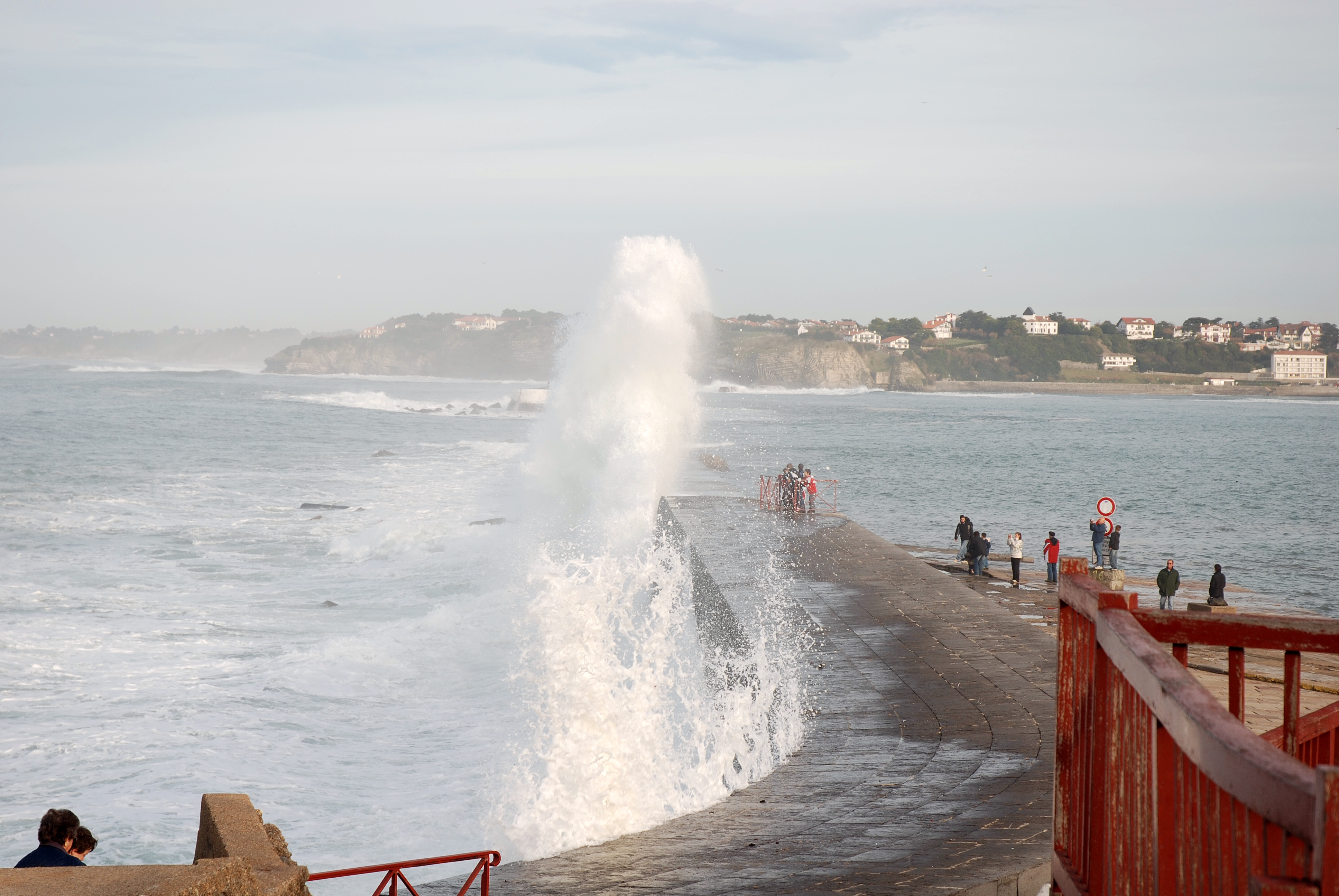 Ciboure, vague sur la digue. Photo prise le 03/01/07 par Harrieta171